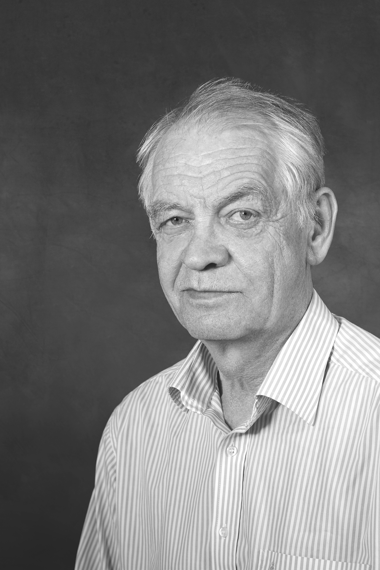 директор Института системного программирования РАН, академик РАН